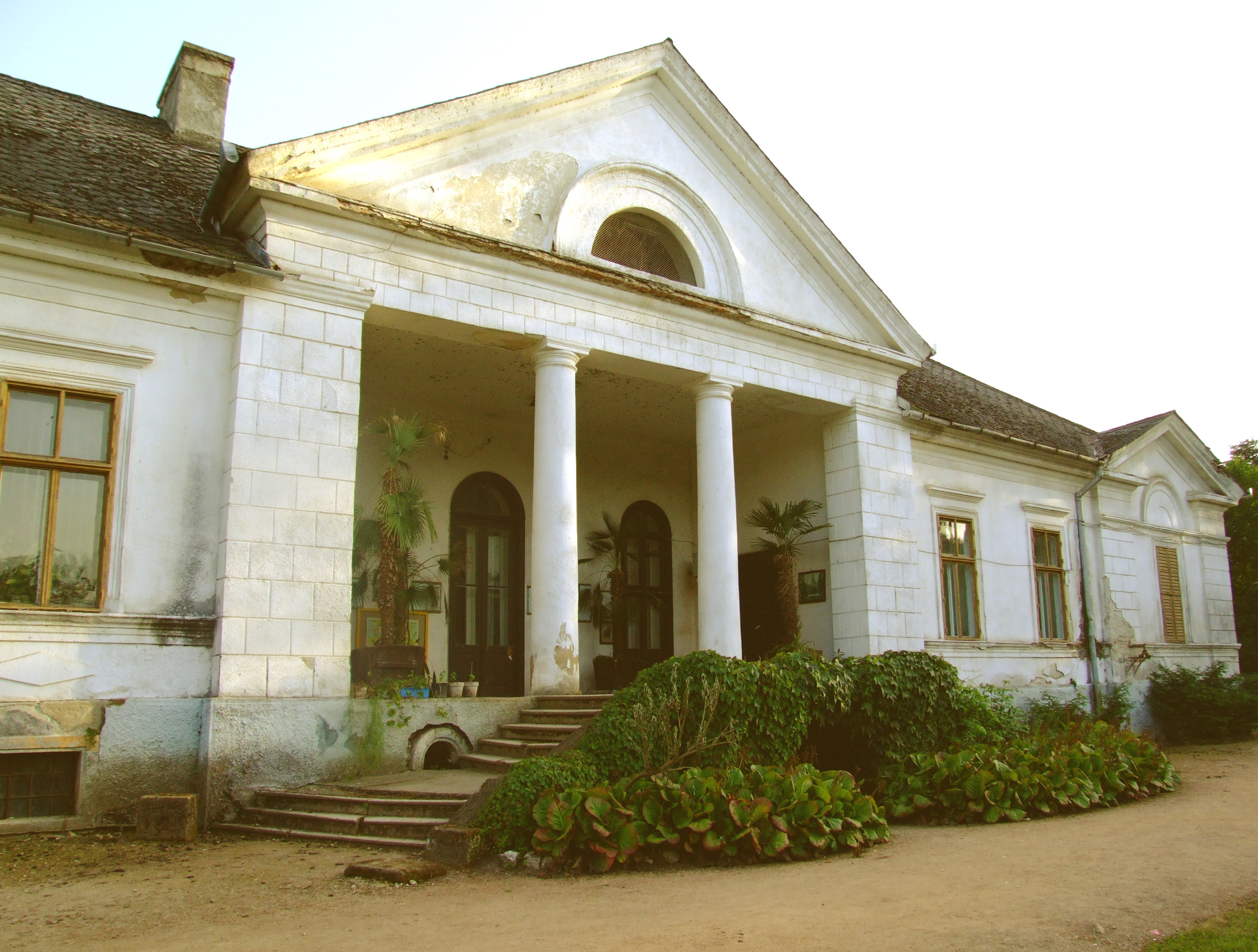 Castelul Bella Fay, Judetul Hunedoara, oras Simeria 01